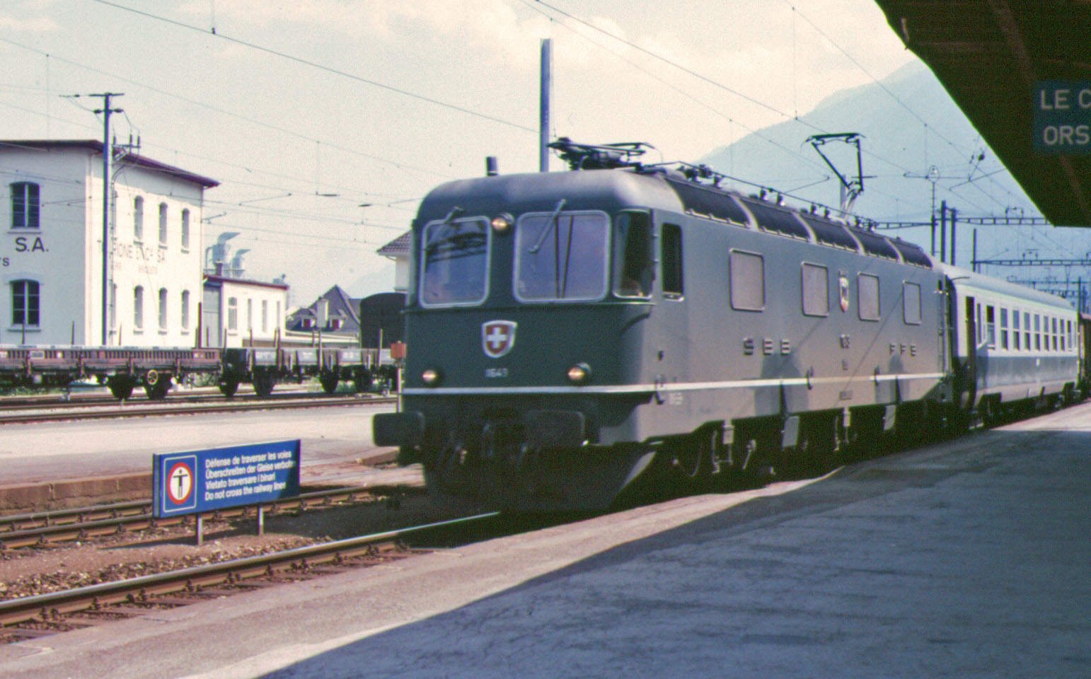 SBB Re 6/6 11649 „Aarberg“ mit internationalen Schnellzug in Martigny